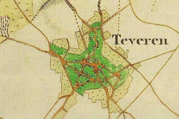 Preußische Kartenaufnahme 1846 - Uraufnahme - (5002 Geilenkirchen)